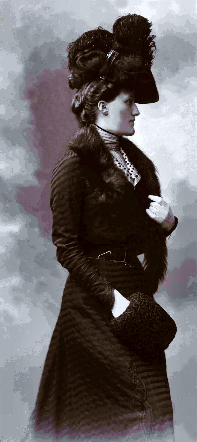 Eva Putz von Rolsberg, verh Wassilko von Serecki